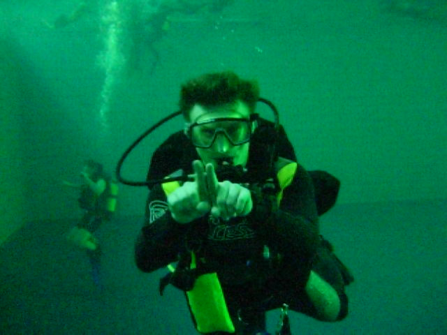 Μείνετε μαζί.